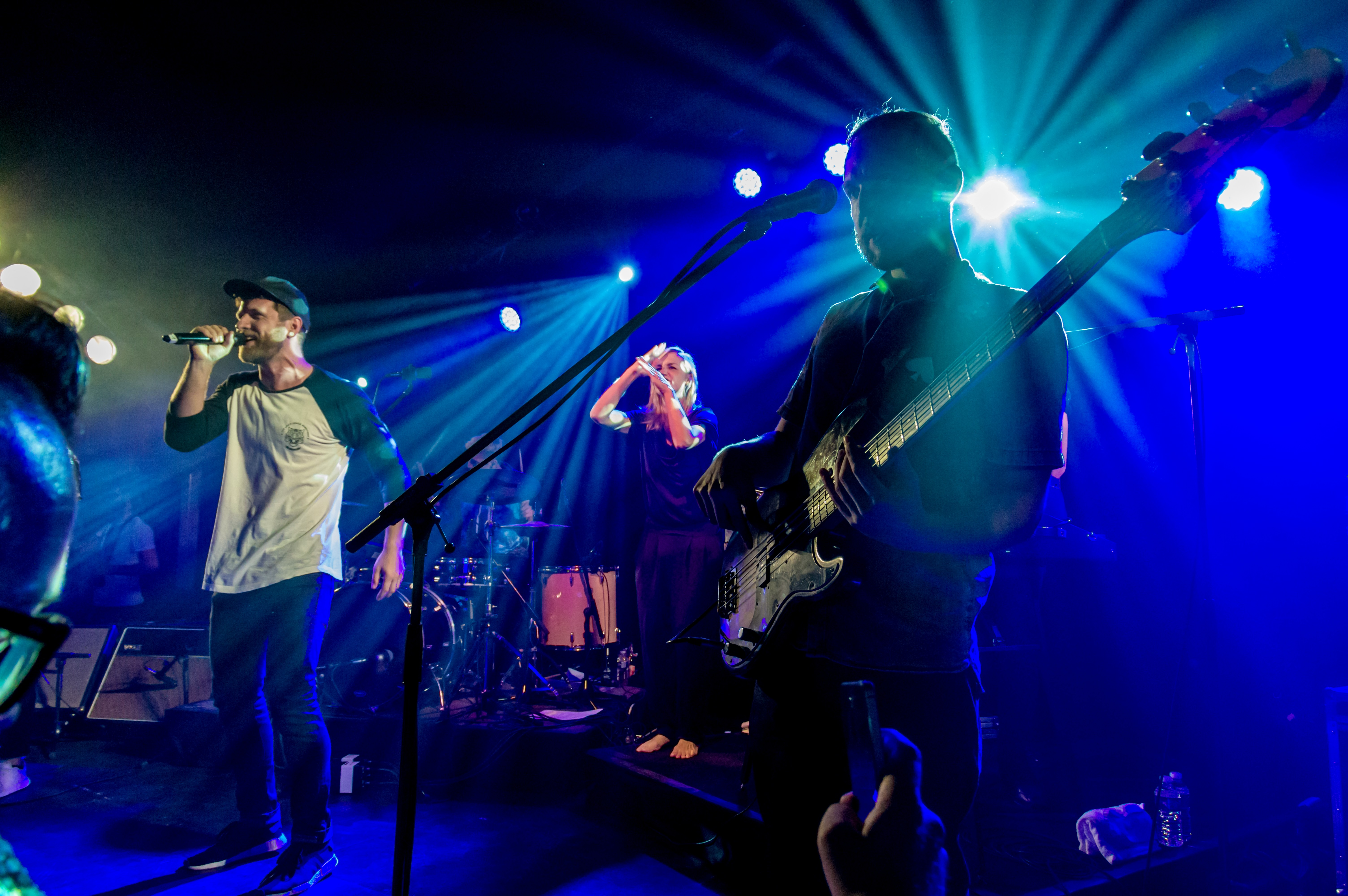 Bilder vom Zelt Musik Festival 2017 in Freiburg im Breisgau Otto Normal Konzert vom 23. 07. 2017